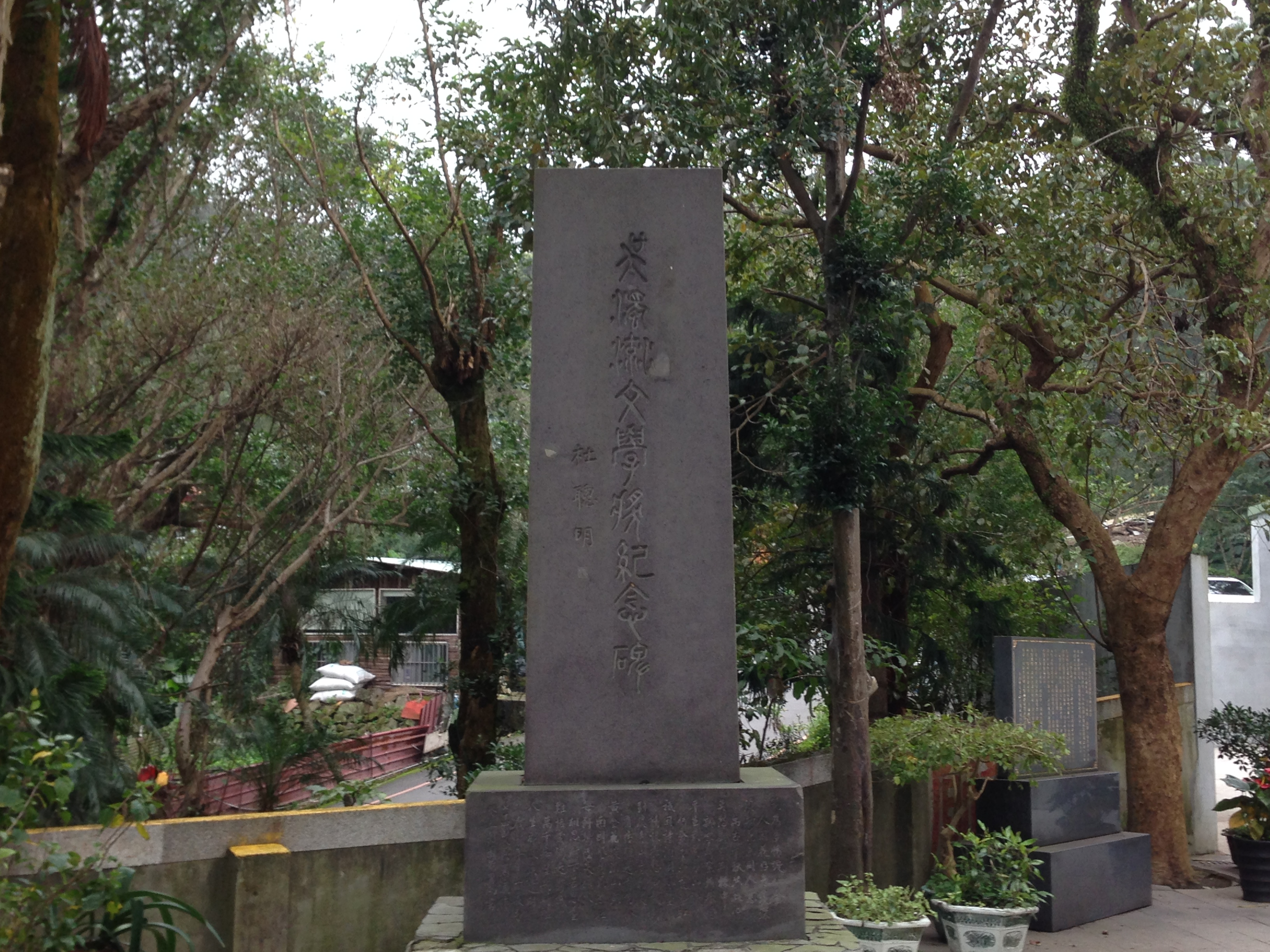 中文（台灣）: 金龍禪寺的吳濁流文學獎紀念碑